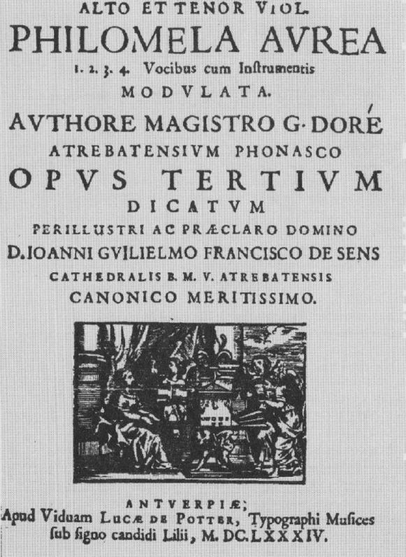 Title page of Ghislain Doré's Philomela aurea, 1684.